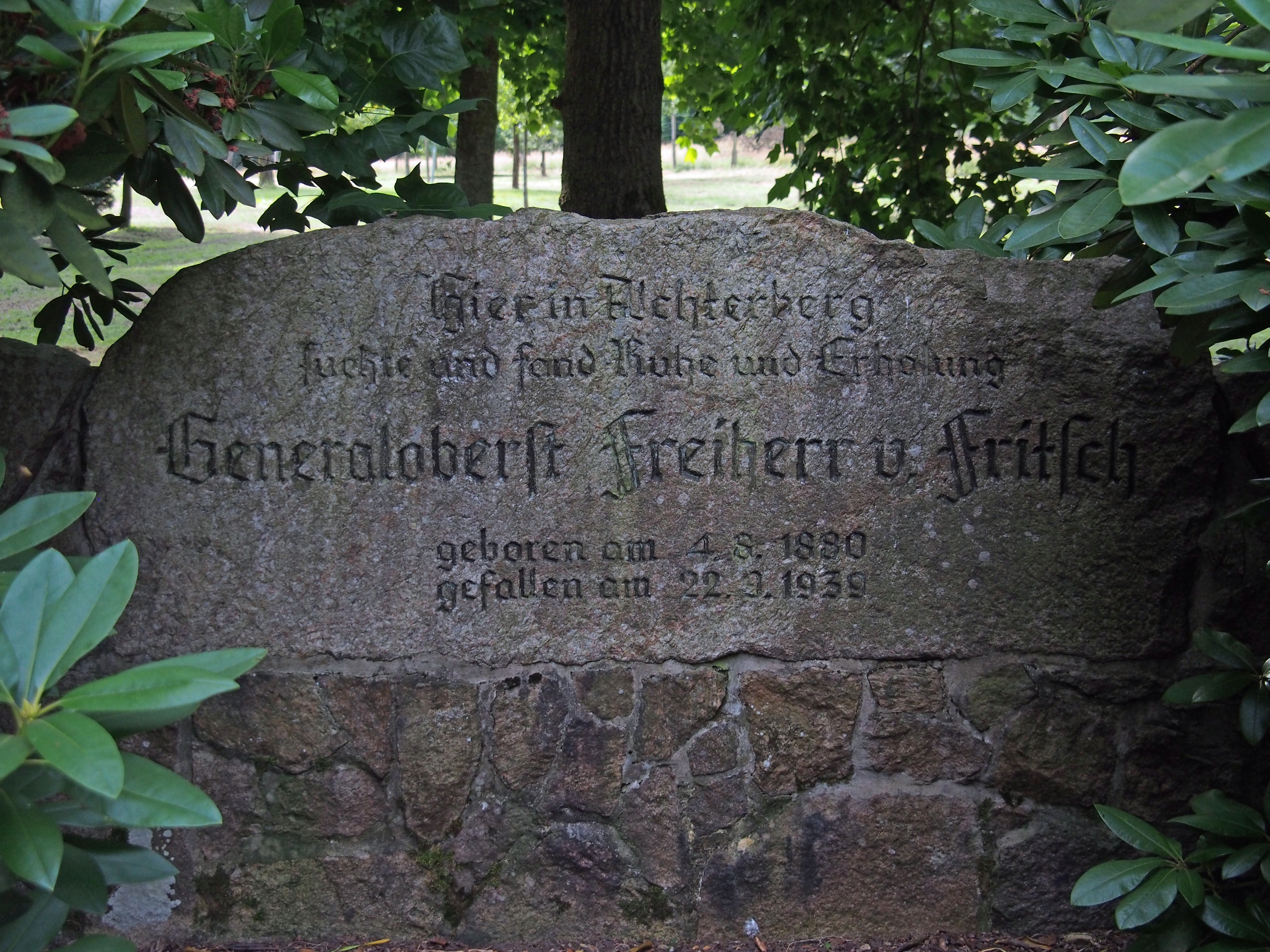 Gedenkstein an Generaloberst Werner Freiherr von Fritsch am ehemaligen Gut Achterberg in der Osterheide